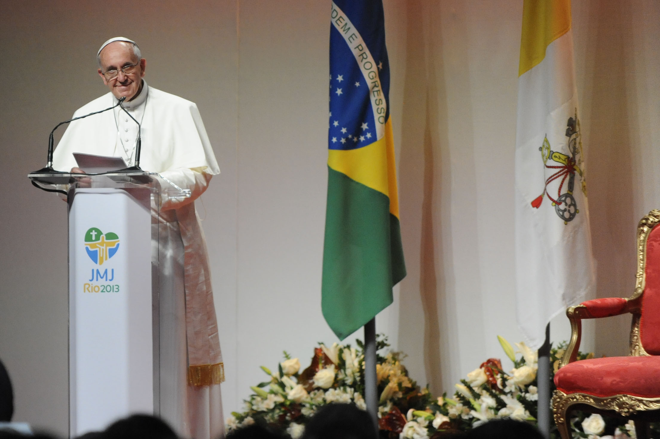 Rio de Janeiro - Papa Francisco embarca de volta para Roma na base aérea do Galeão. Antes participa de cerimônia de despedida com o vice-presidente Michel Temer.